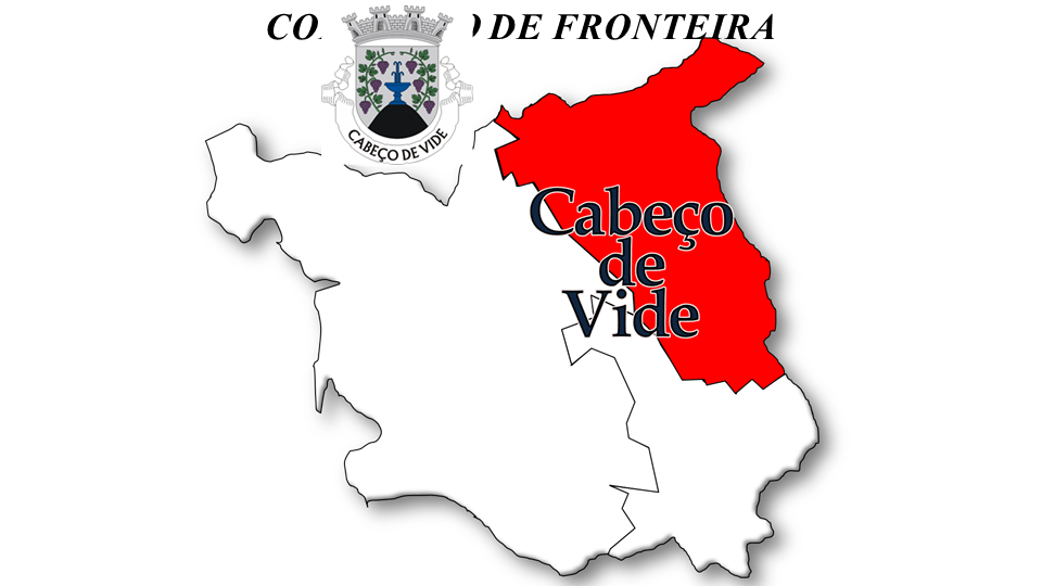 Evolução da População